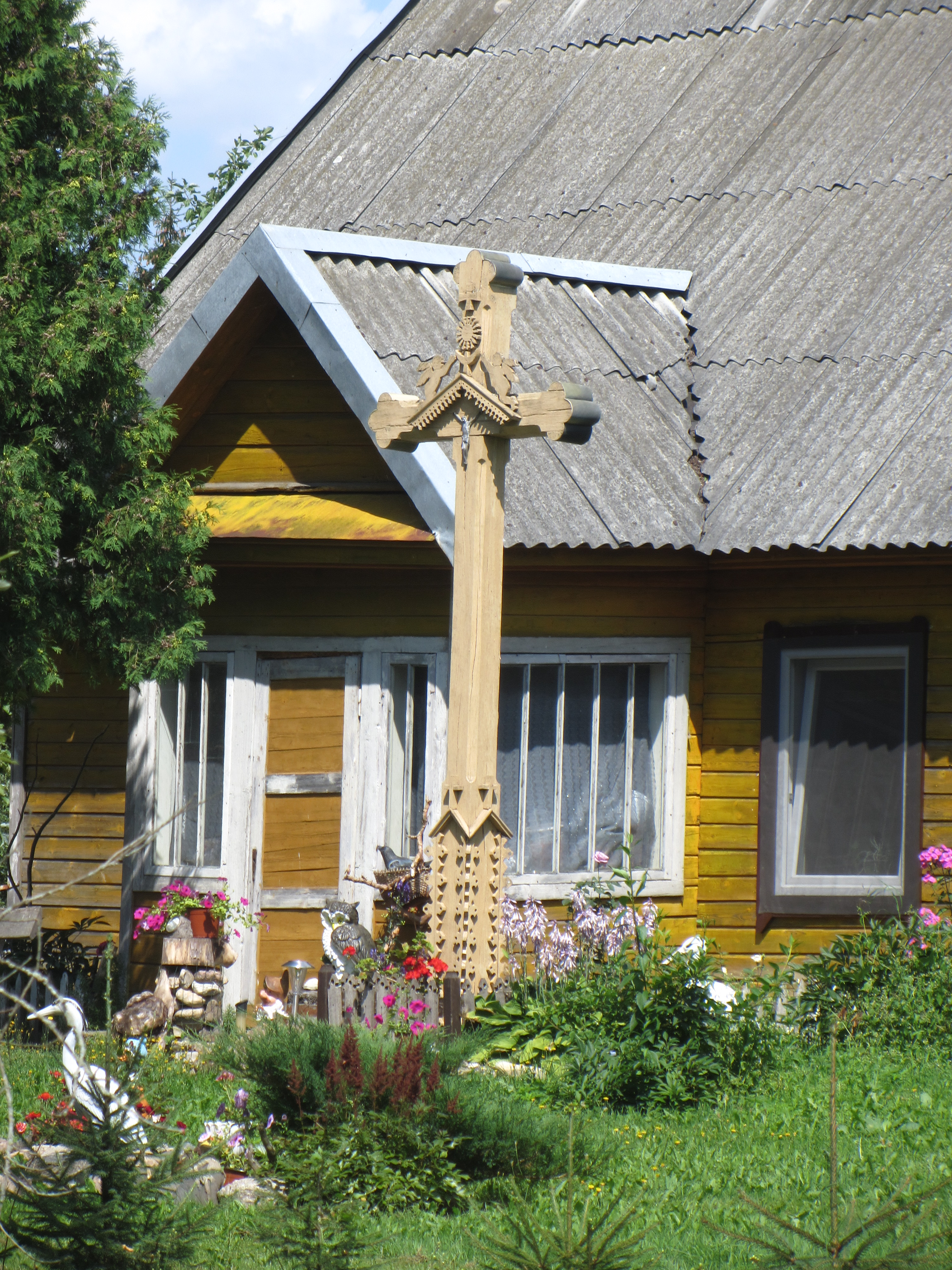 Grybinė 32273, Lithuania